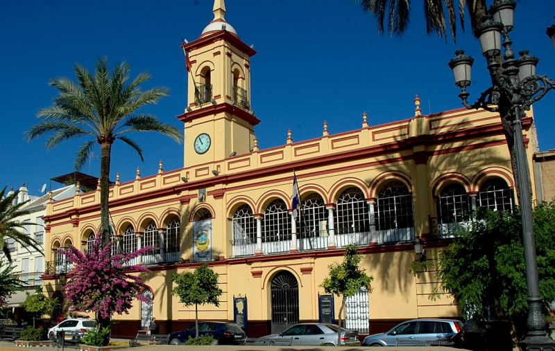 Ayuntamiento de Arahal